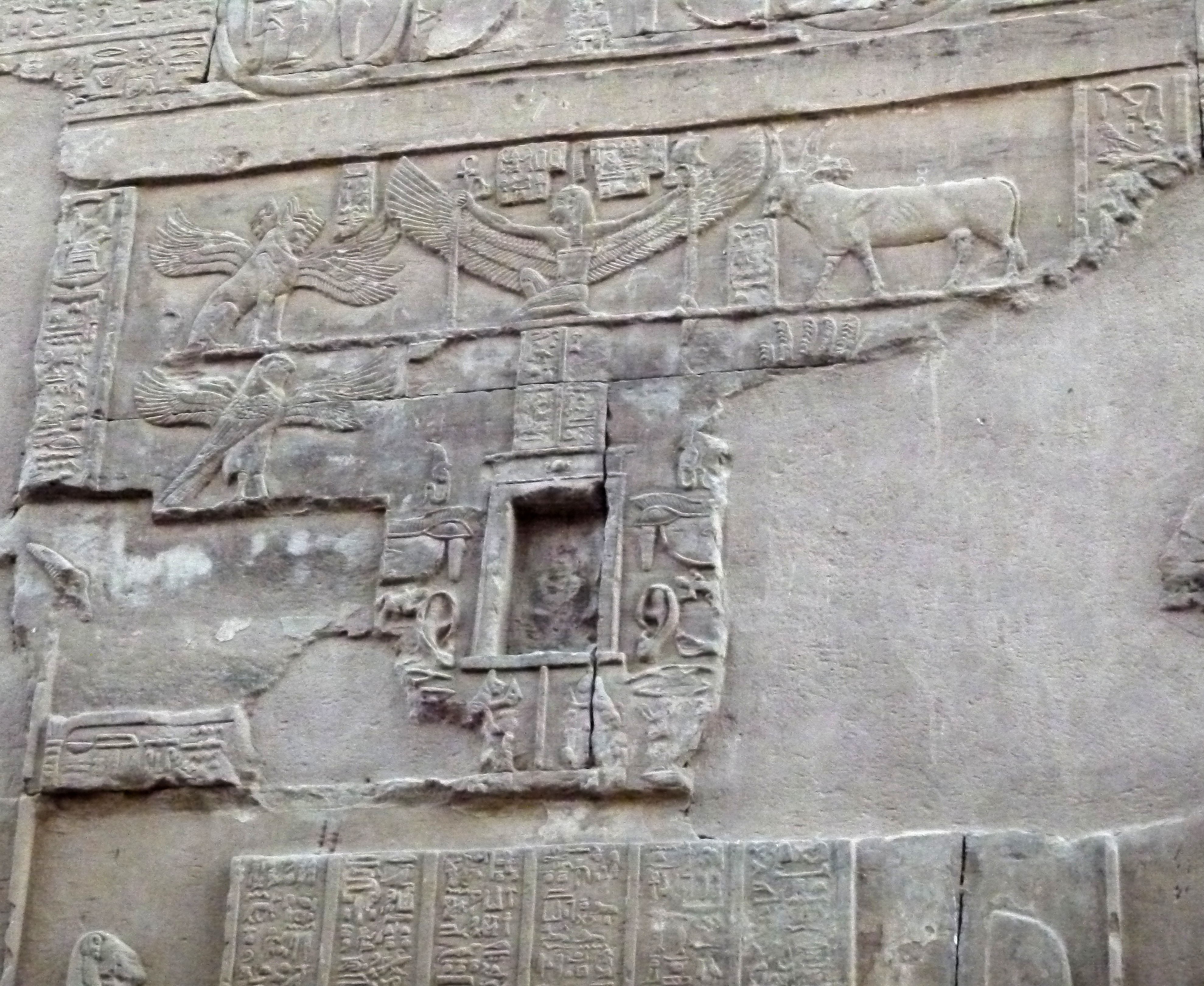 Храм в Ком Омбо, тетраморф на внутренней стене узкой галереи.